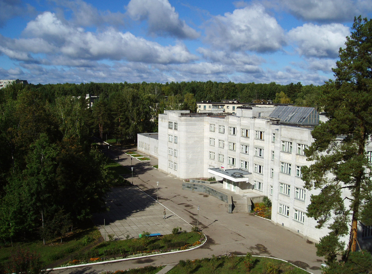 Димитровград, Городская гимназия (Школа №13)